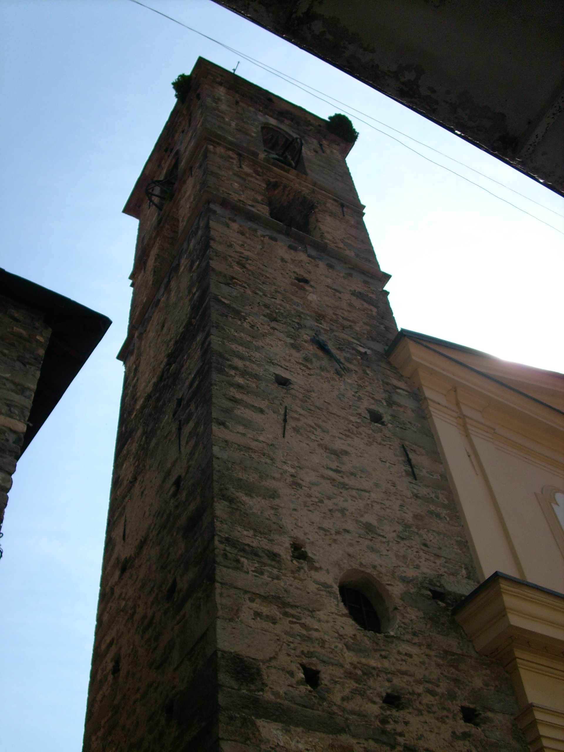 Campanile della chiesa di San Lorenzo di Molini di Triora, Liguria, Italia